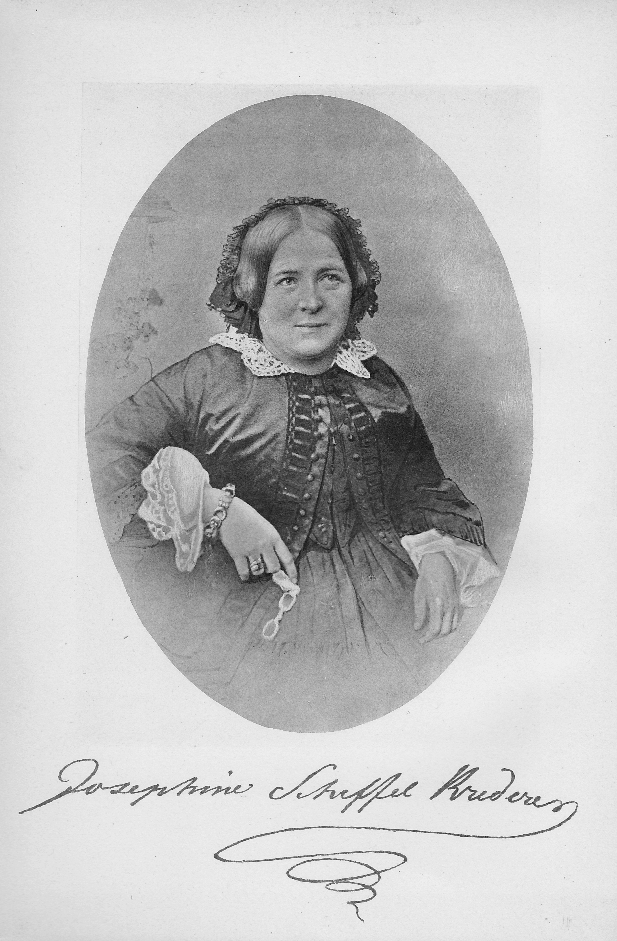 Josephine Scheffel, Salonnière, Schriftstellerin und Philantropin. Frontispiz des Buches „Gedichte von Josephine Scheffel“, Adolf Bonz & Comp., Stuttgart 1892. Bildunterschrift: „Josephine Scheffel Krederer“.